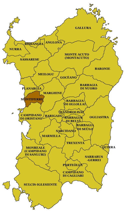 Sardinian Subregions